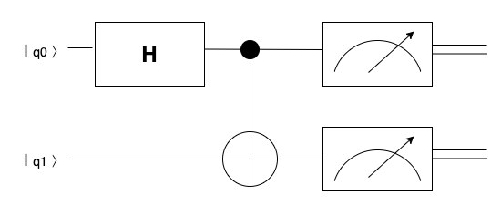 Circuit quantique permettant d'accéder aux états de Bell. Il comprend une porte de Hadamard, une porte C-NOT et deux points de mesure.